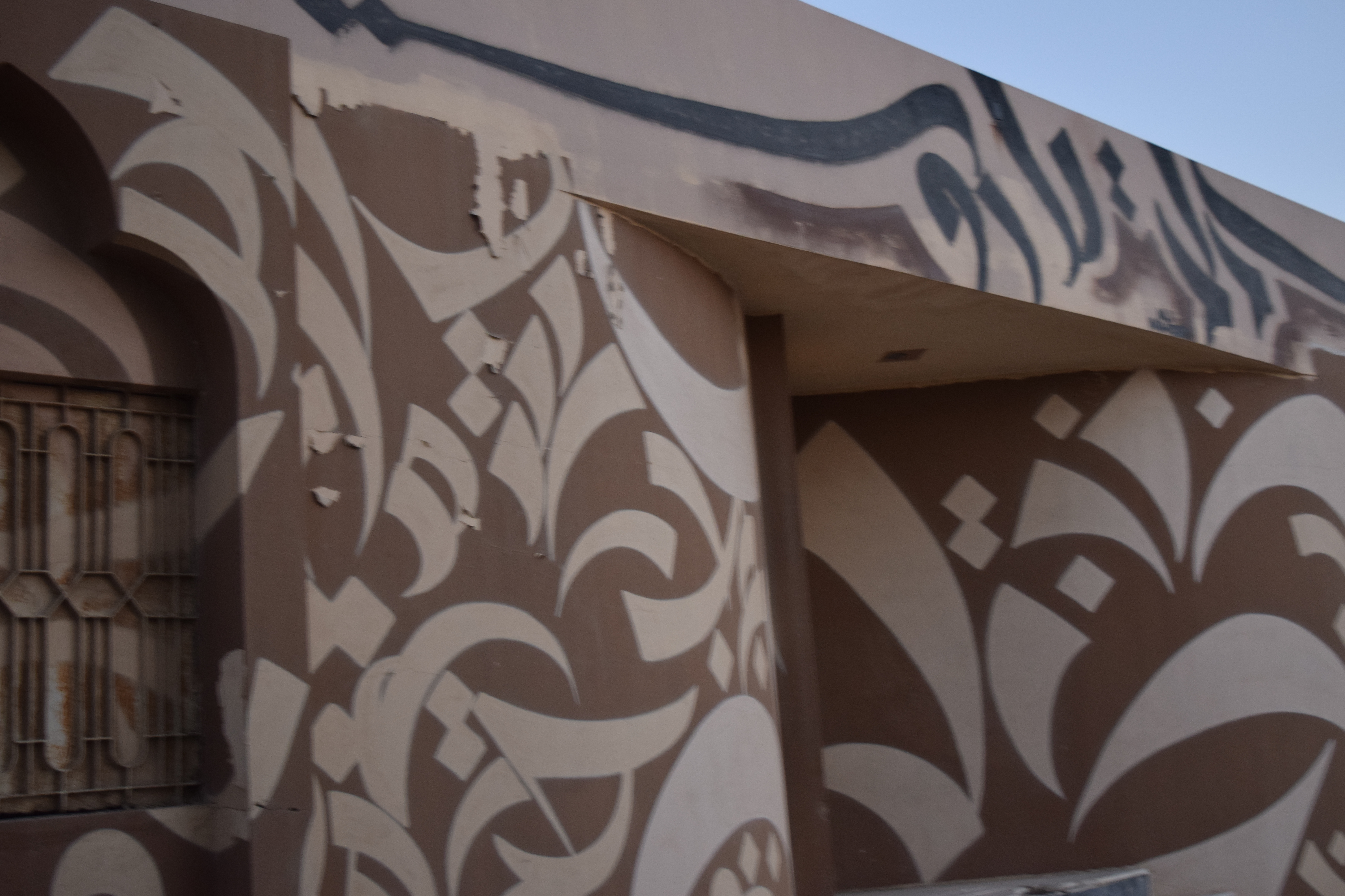 صورة لحمام عين تاروت حديثاً